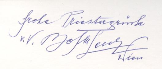 Handschriftliche Buchwidmung von Pater Johannes Maria Lenz, Wien; NS-Opfer, KZ-Häftling, Buchautor